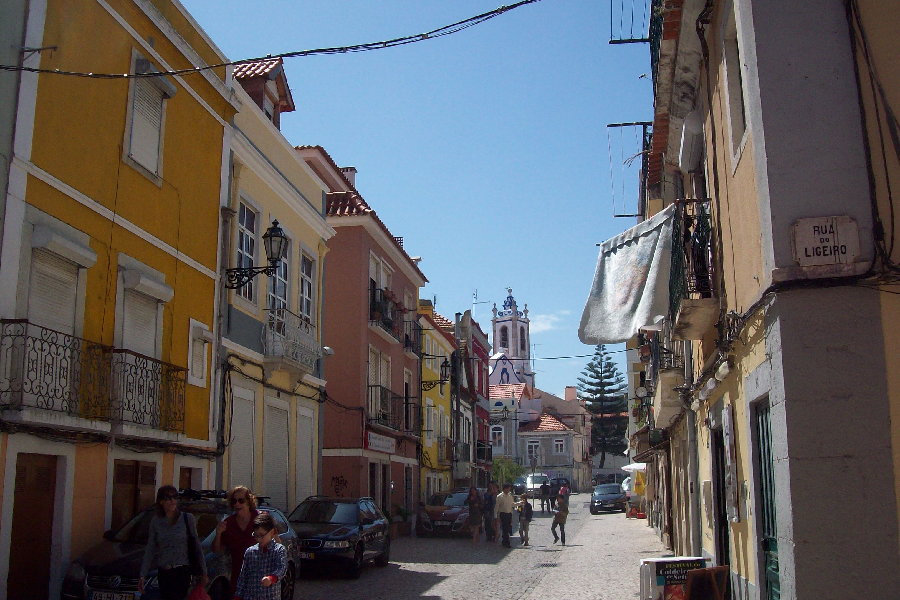 Setúbal - Rua no Troino com a Igreja da Nossa Senhora da Anuncia ao fundo.